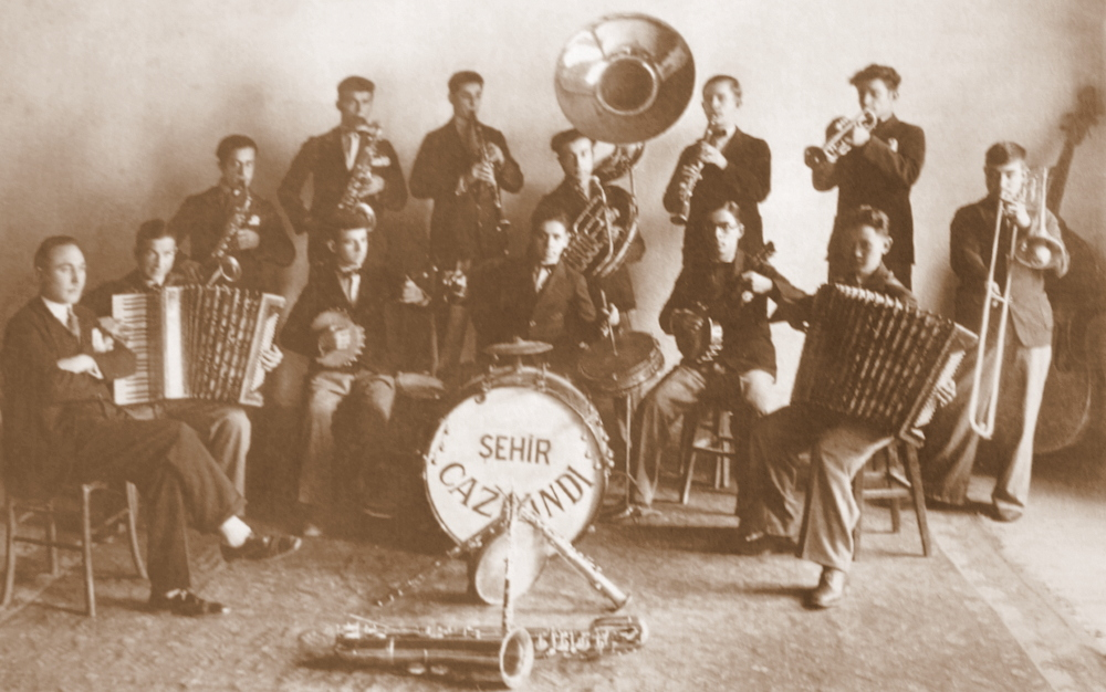 İstanbul Belediye Konservatuvarı nefesli sazlar bölümü öğrencilerinden oluşan şehir caz bandı 1930